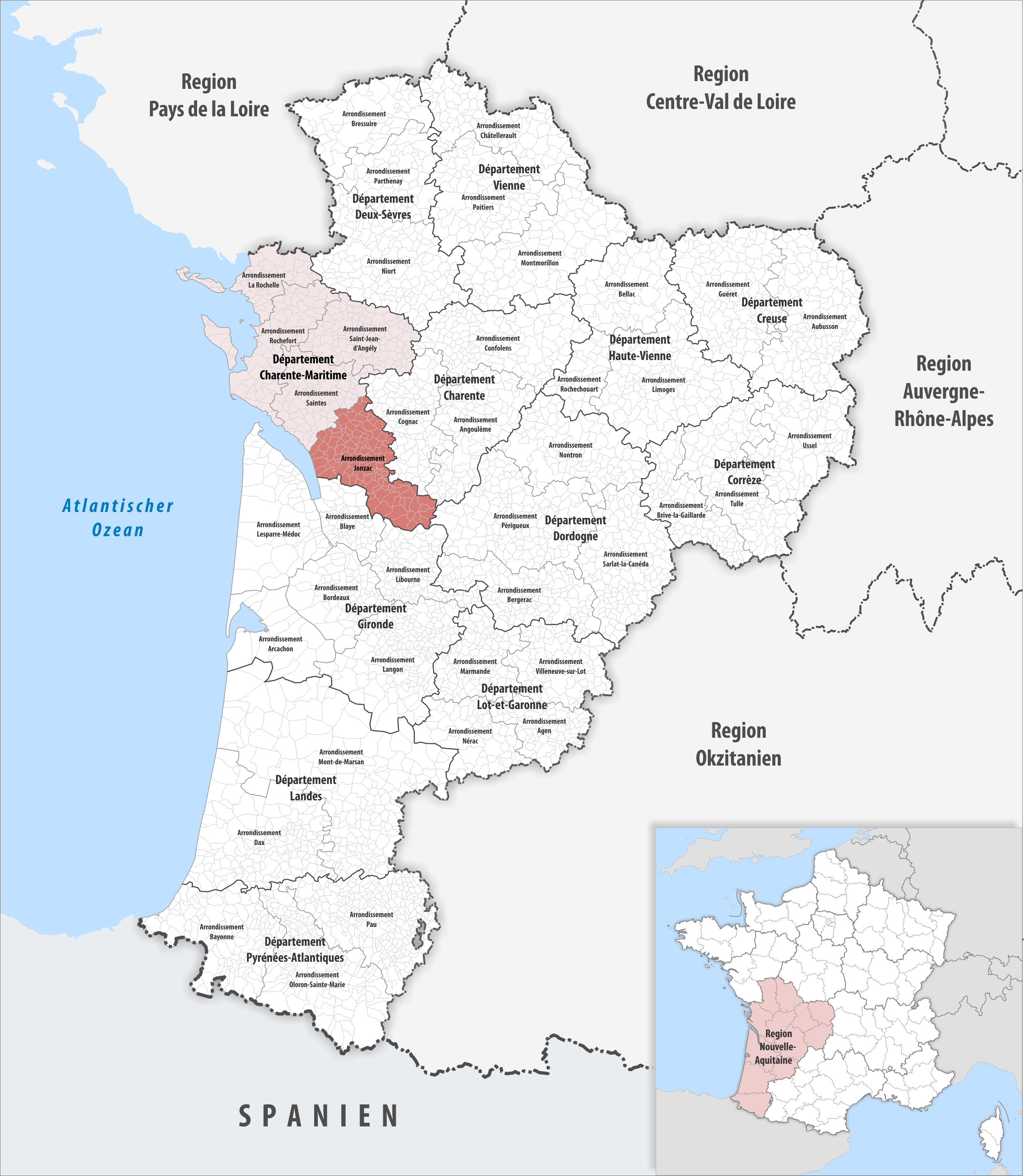 Lage des Arrondissements Jonzac